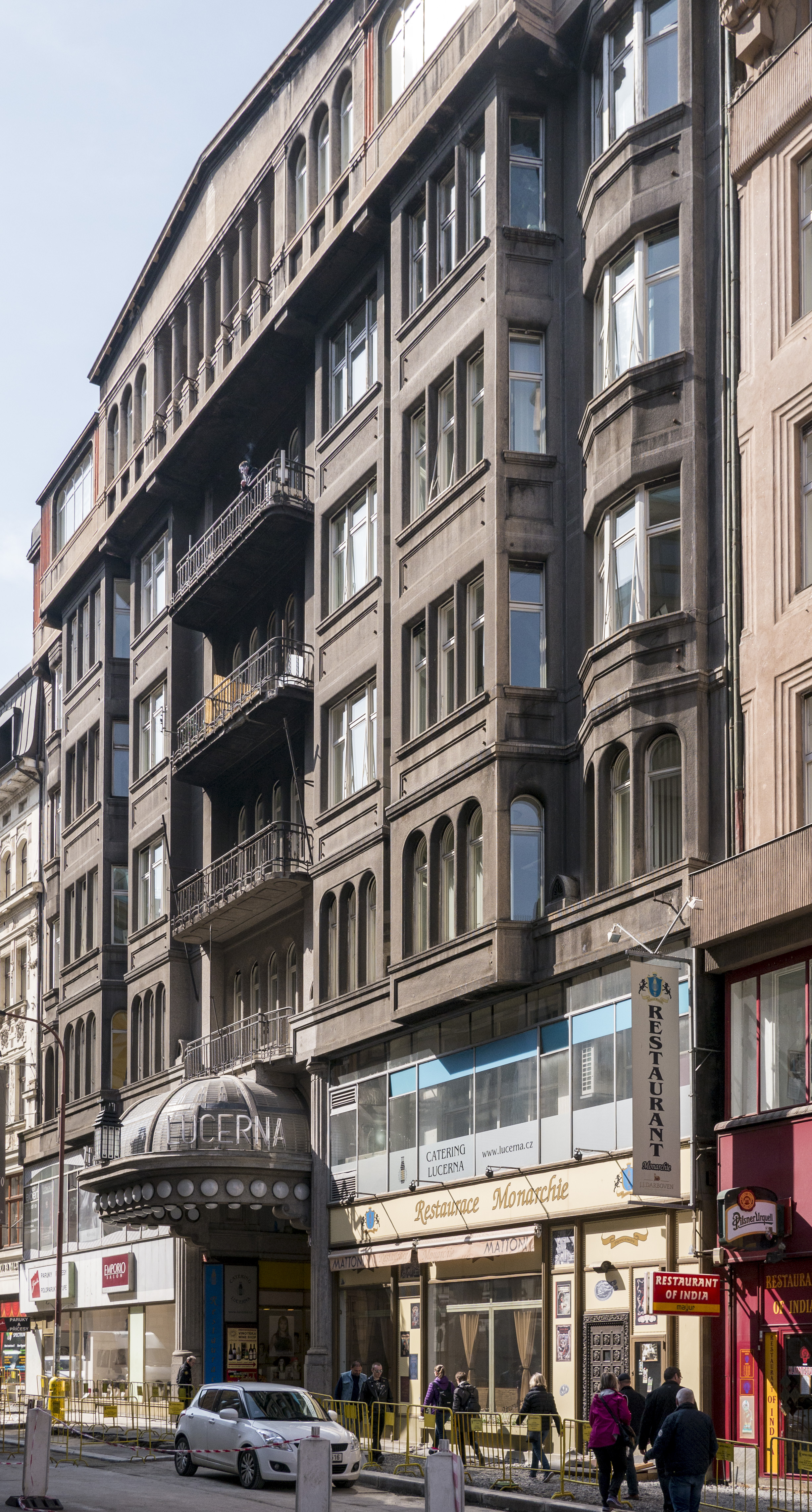 Parg Palais Lucerna